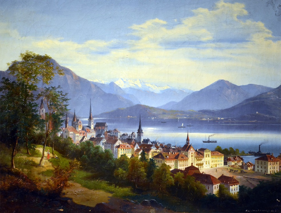 Die Stadt Zug